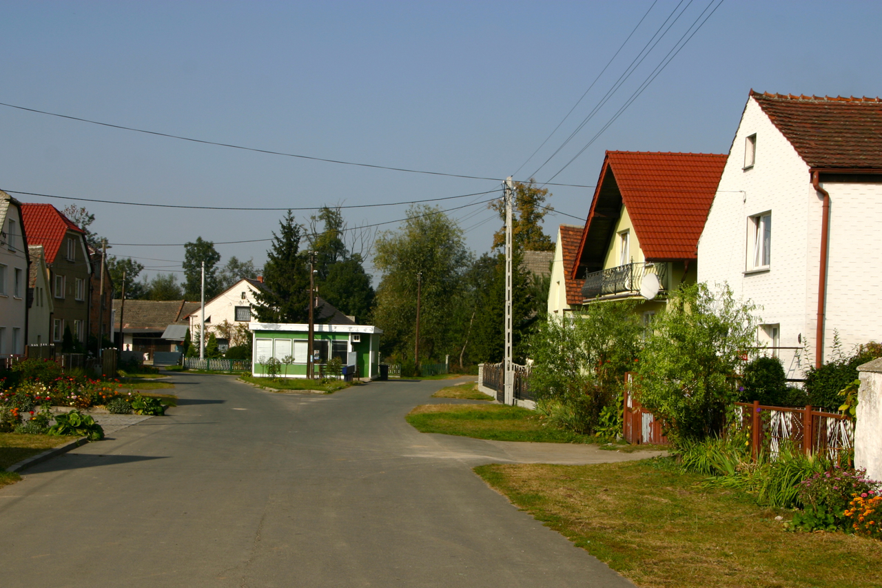 Kamionka (dodatkowa nazwa w j. niem. Kamionka) – wieś w Polsce położona w województwie opolskim, w powiecie kędzierzyńsko-kozielskim, w gminie Reńska Wieś.